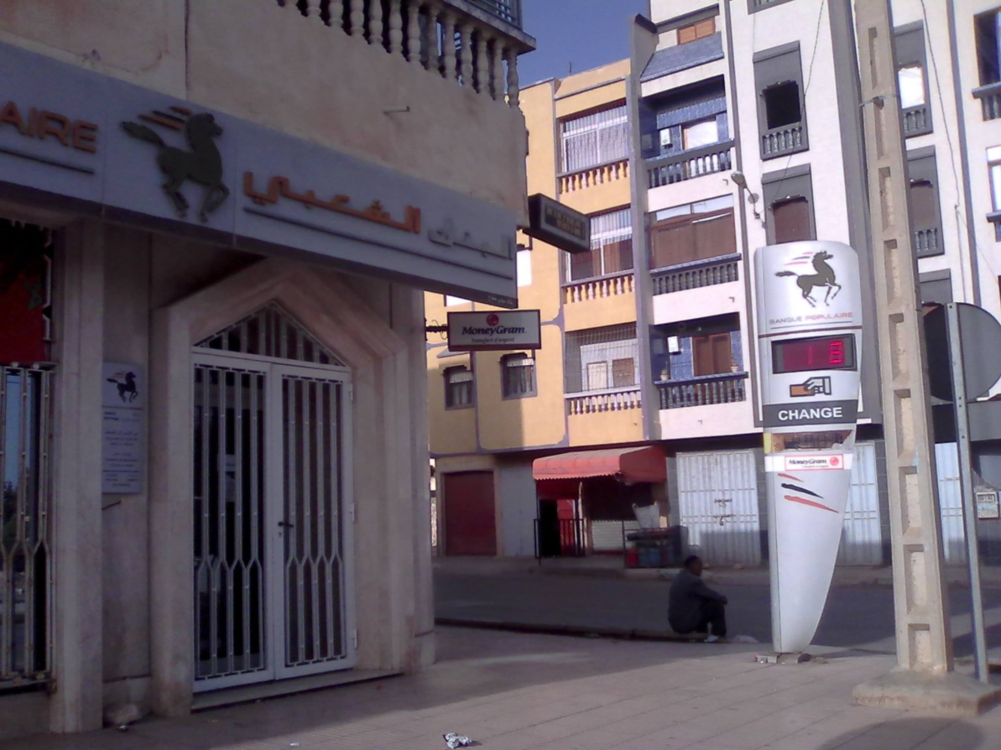 وكالة بنك الشعبي في سيدي حجاج